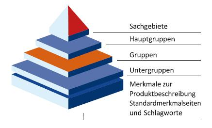 eCl@ss-Struktur